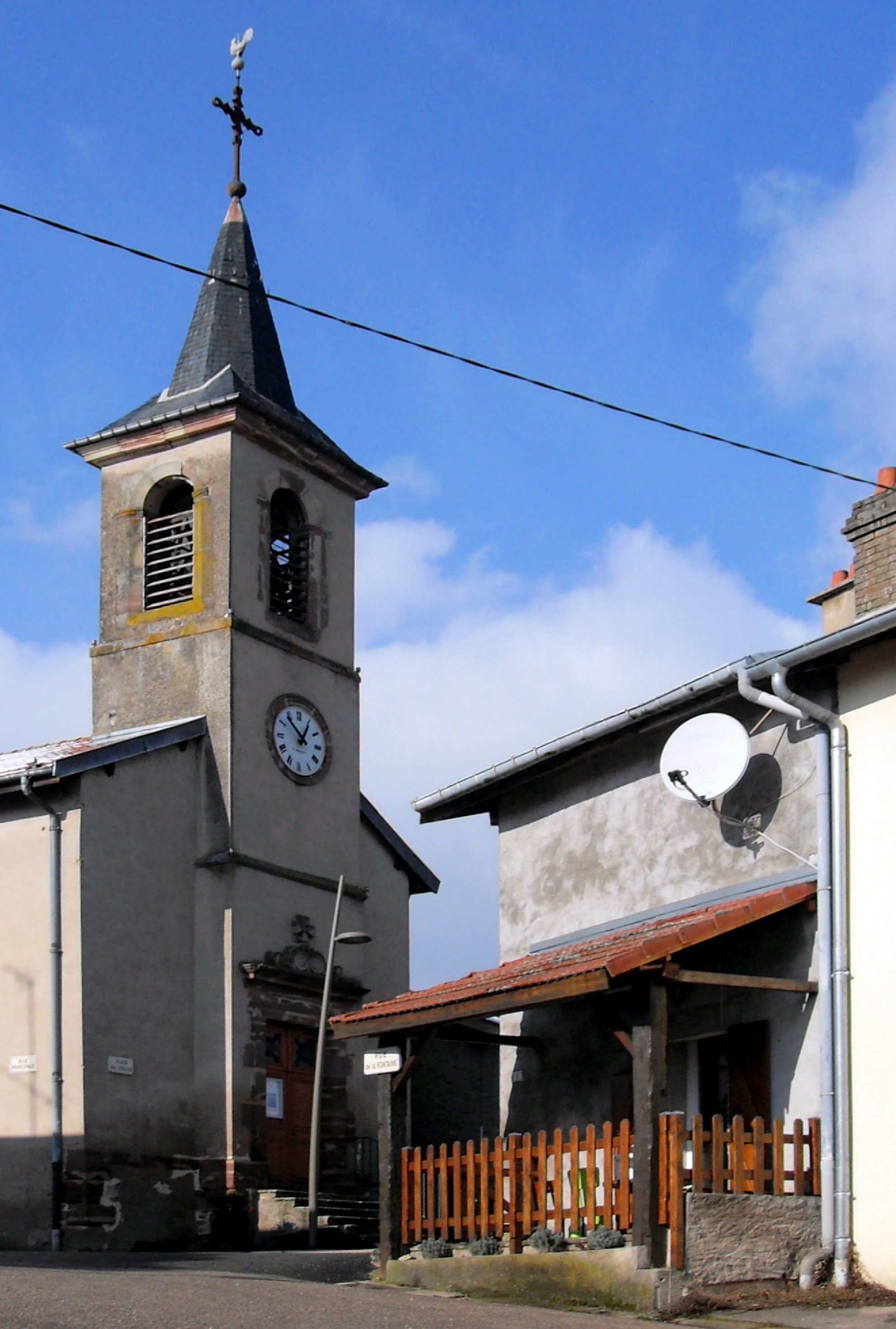 L'église Saint-Mansuy à Franconville